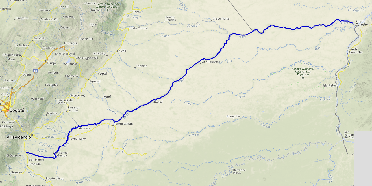 carte réalisée sur umap This map may be incomplete, and may contain errors. Don't rely solely on it for navigation.